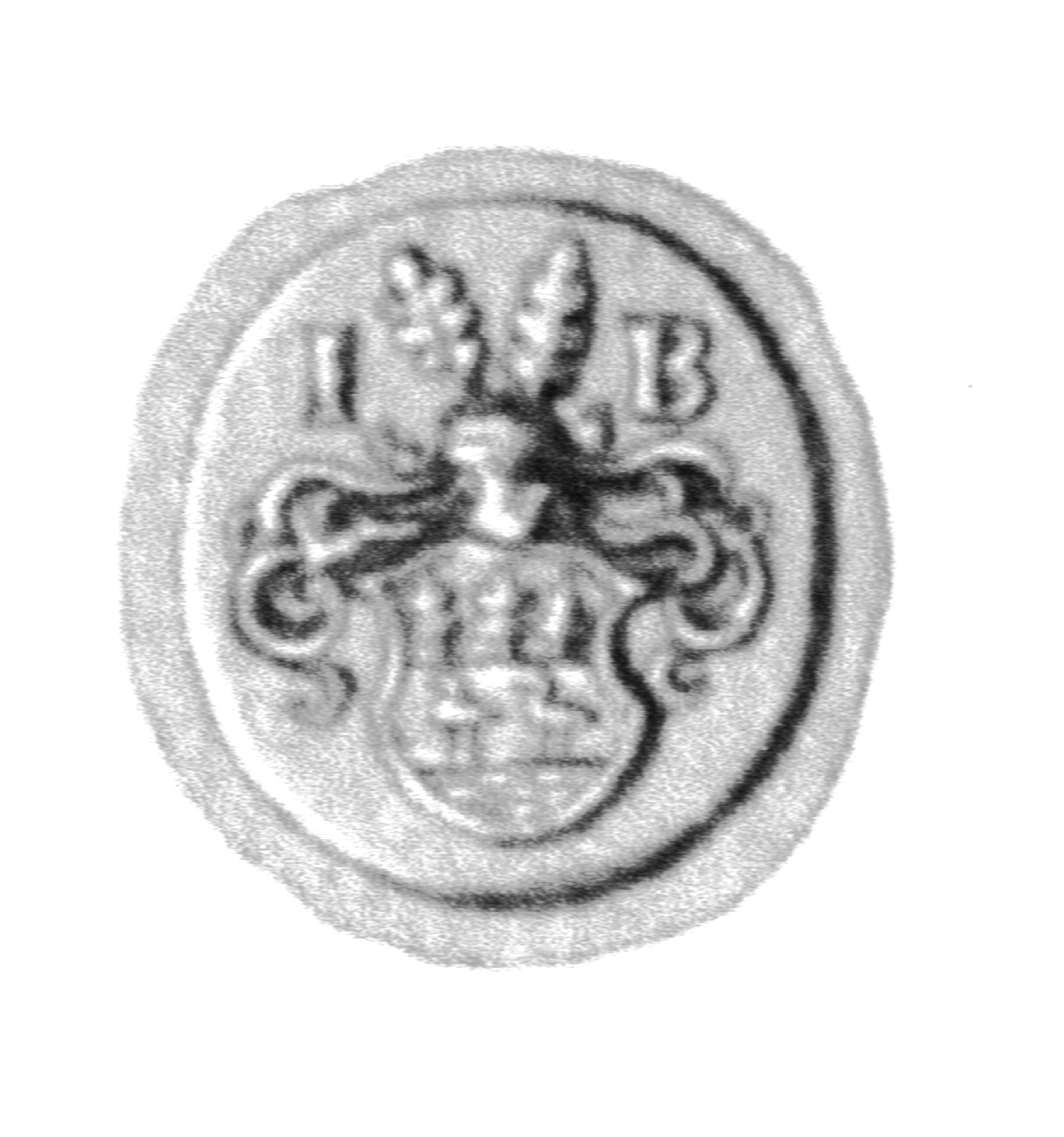 Siegel des Ratsmannes Johann Bro(c)kes. Das Siegel stammt aus der Zeit um 1576. Siehe Emil Ferdinand Fehling: Lübeckische Ratslinie, Nr. 680 (Johann Brokes).